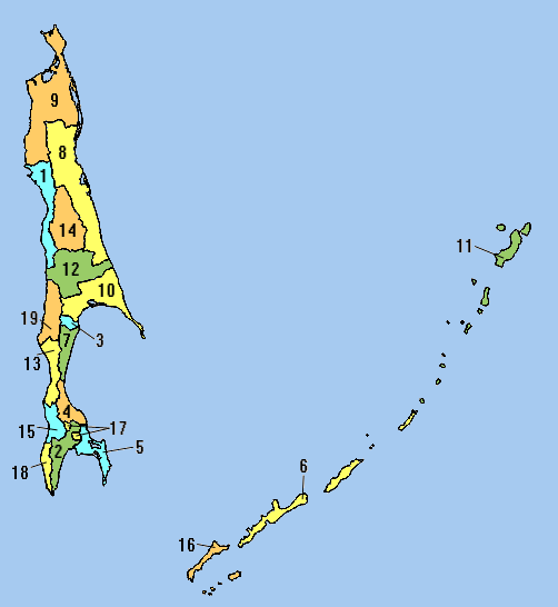 Административно-территориальное деление Сахалинской области